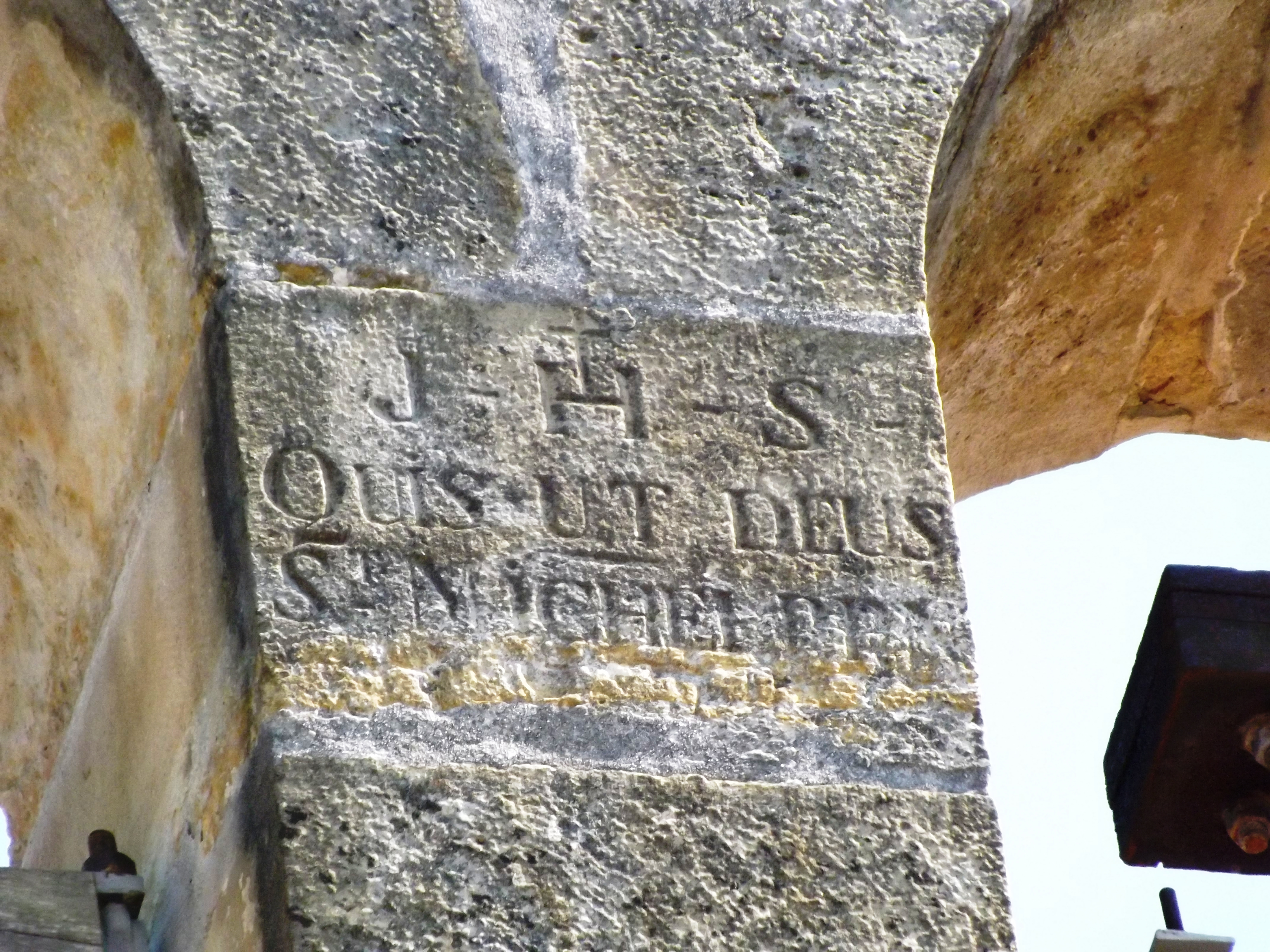 Eglise St-Michel de Lacajunte (détail), Landes, France